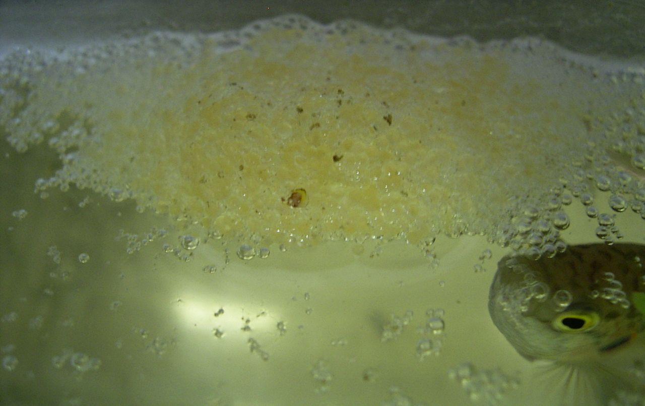 Nido de burbuja de Macropodus opercularis. Author: Tenn Hian-kun Description: Paradise fish's spawn is protected by the male fish